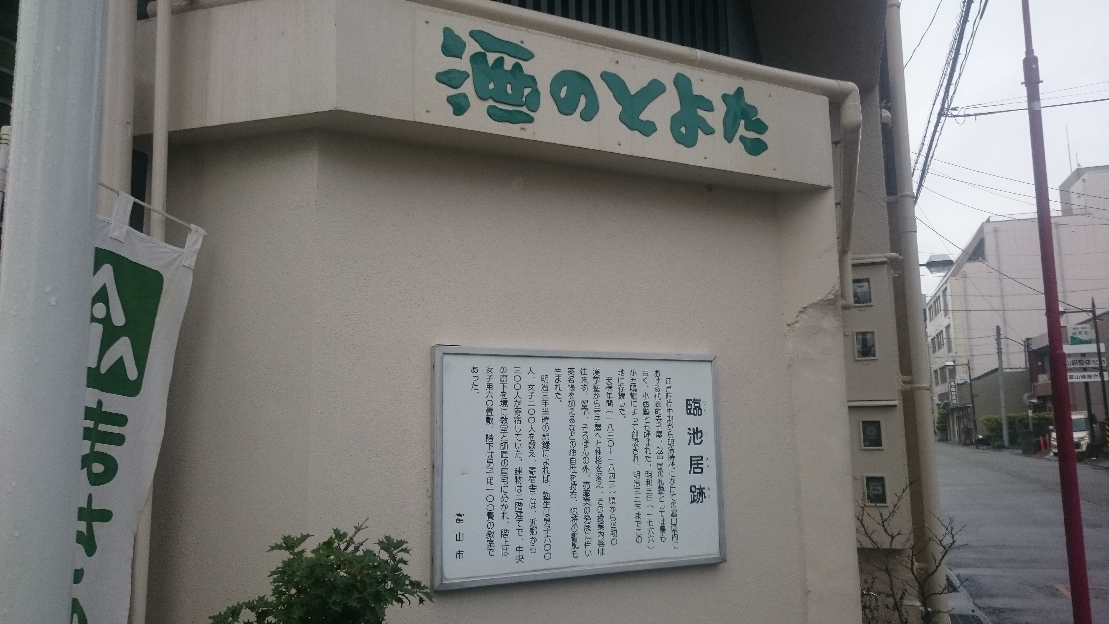 明治３年、富山市に開かれた寺子屋「小西塾」の跡地。日本三大寺小屋と称されるぐらいに大規模な寺小屋だと言われています。